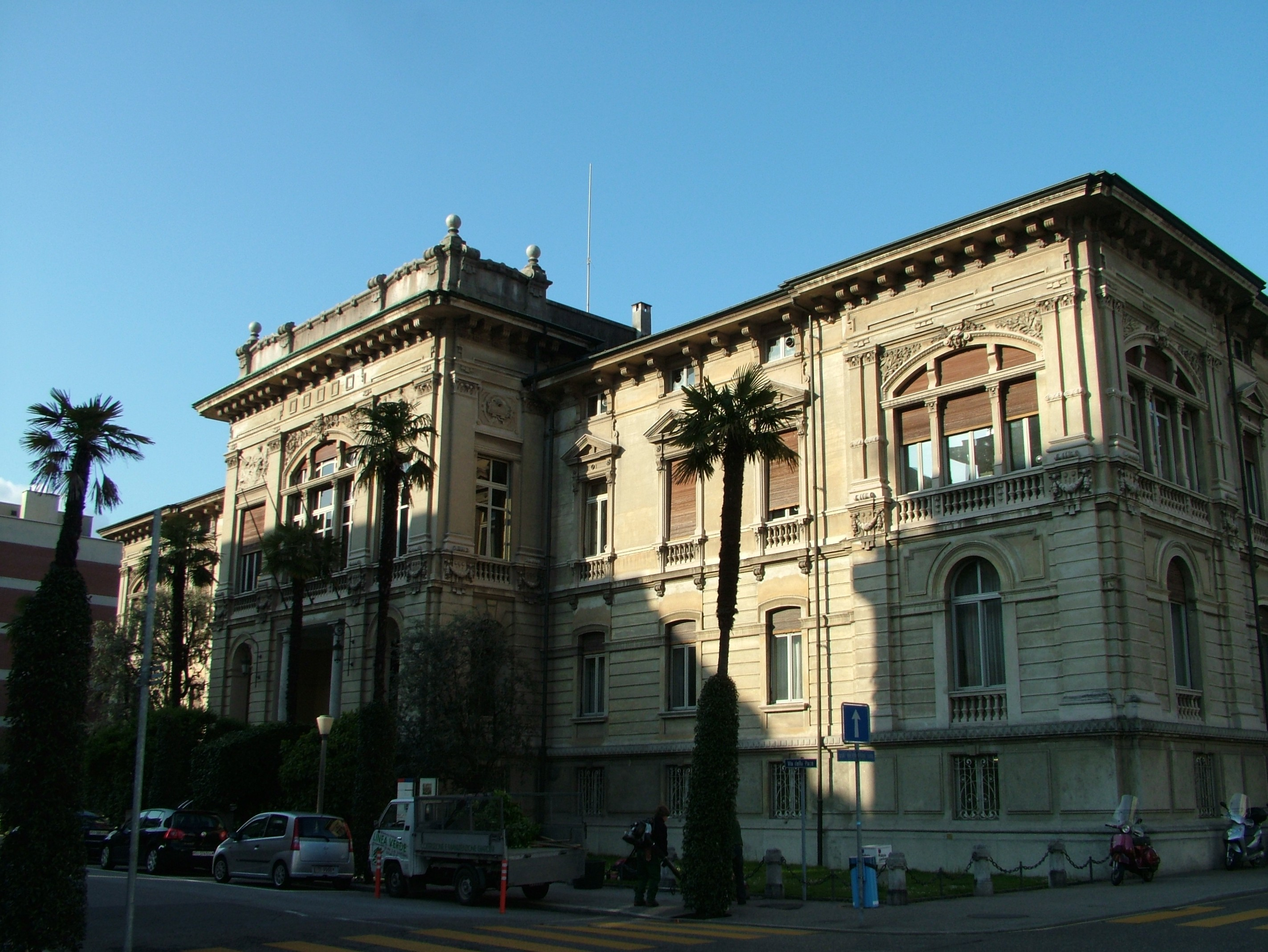 Locarno, Tessin, Schweiz, ehemaliges Gerichtsgebäude, heute Kantonspolizei, 1925 das Gebäude in dem die Verträge von Locarno abgeschlossen wurden